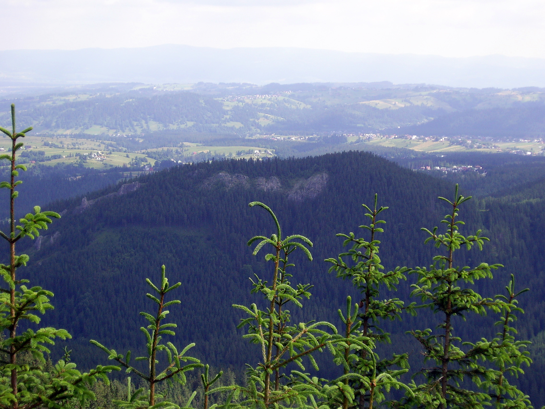 Mały Kopieniec ze Skupniowego Upłazu